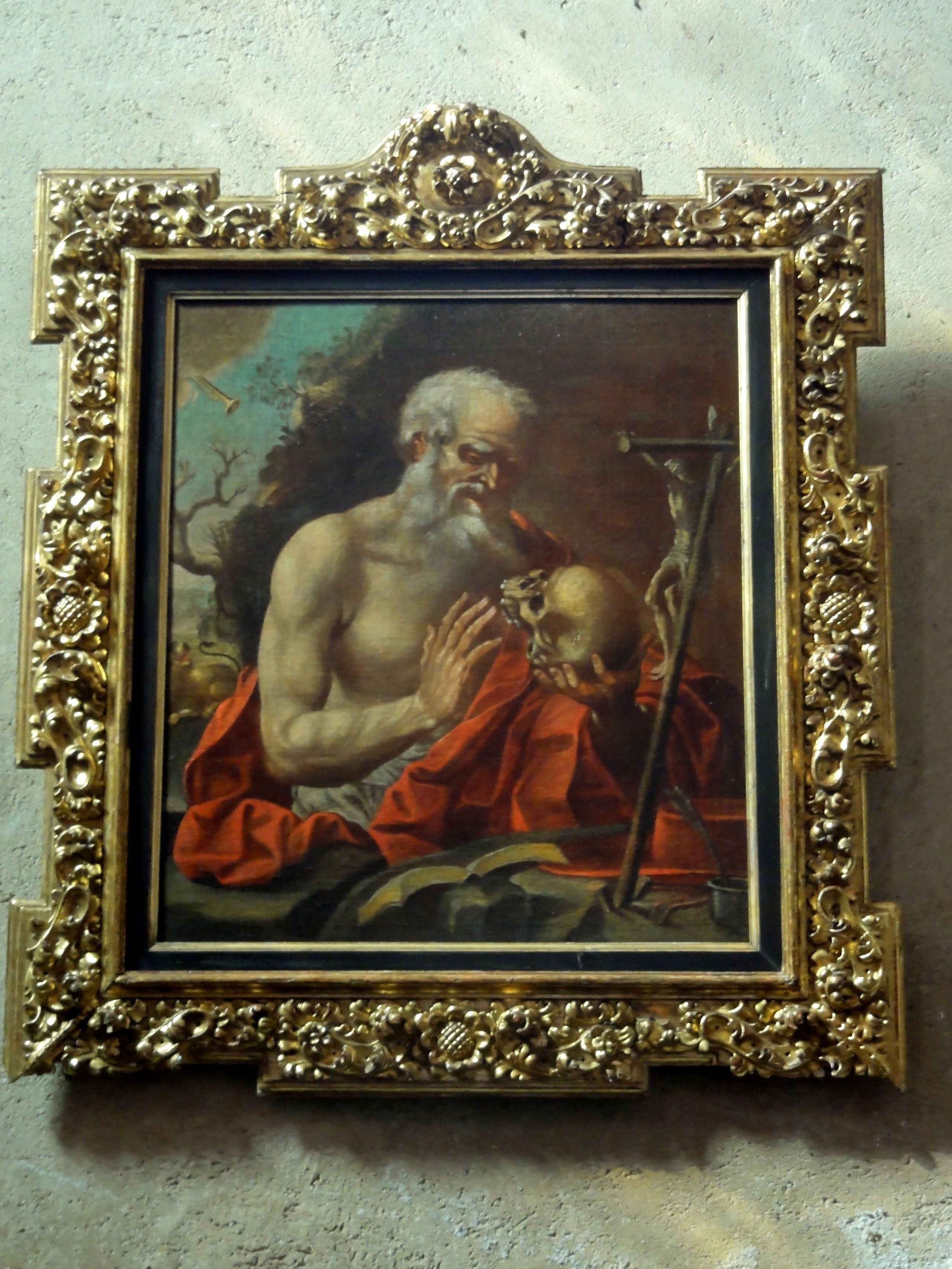 Tableau - saint Jérôme méditant.